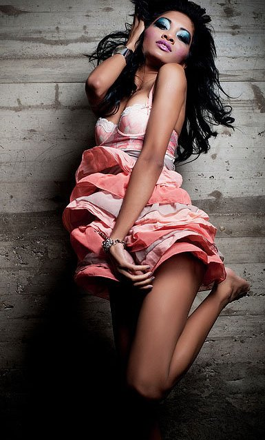 Diyana